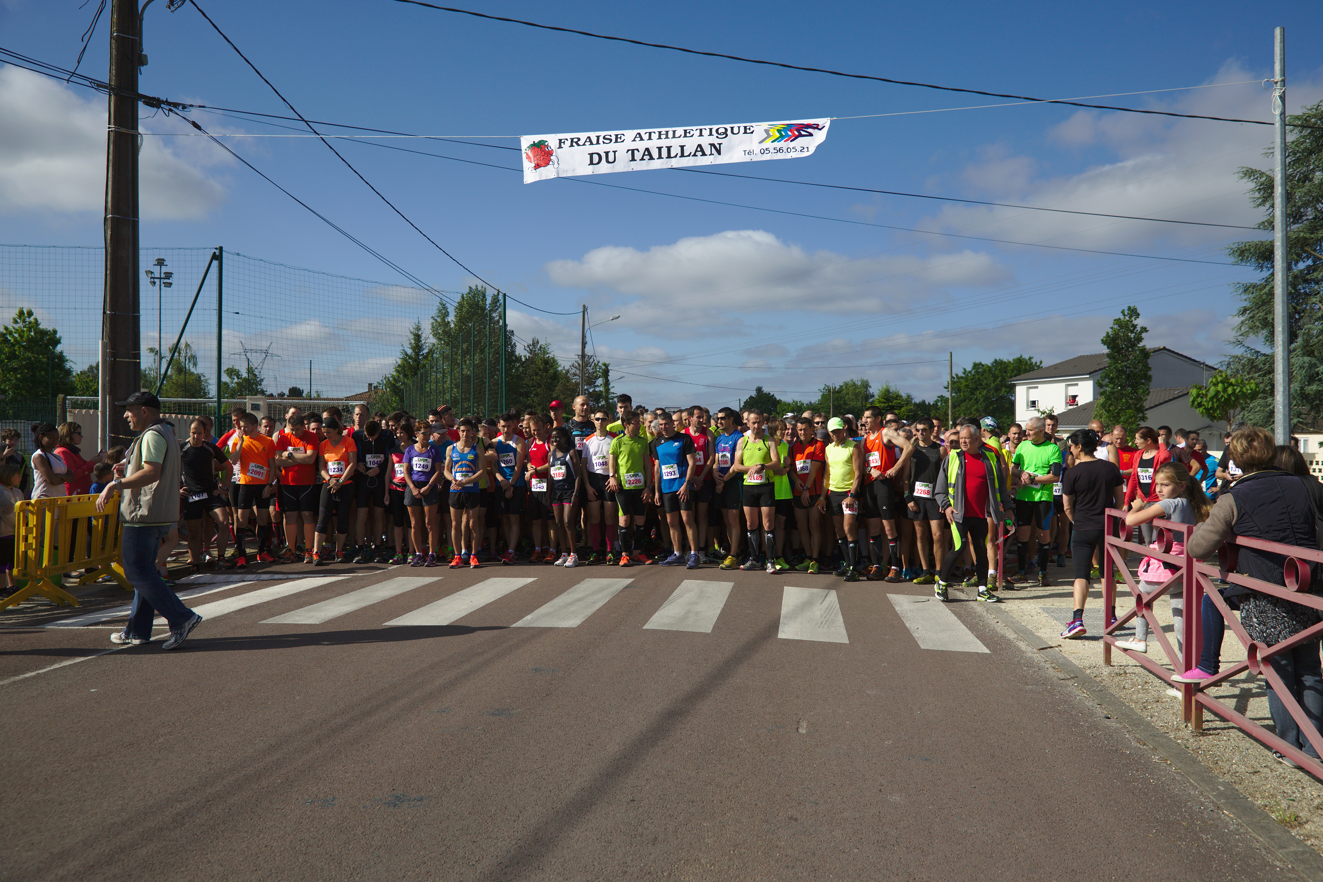 Départ du Trail du Taillan